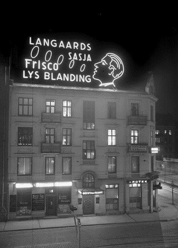 Lysreklame for Langgaards Sasja Frisco på taket av Valkyrie Restaurant, Valkyriegata 15, Oslo. 1939. Fotograf Næss, Erik. Oslo byarkiv, Tunnelbanekontoret.